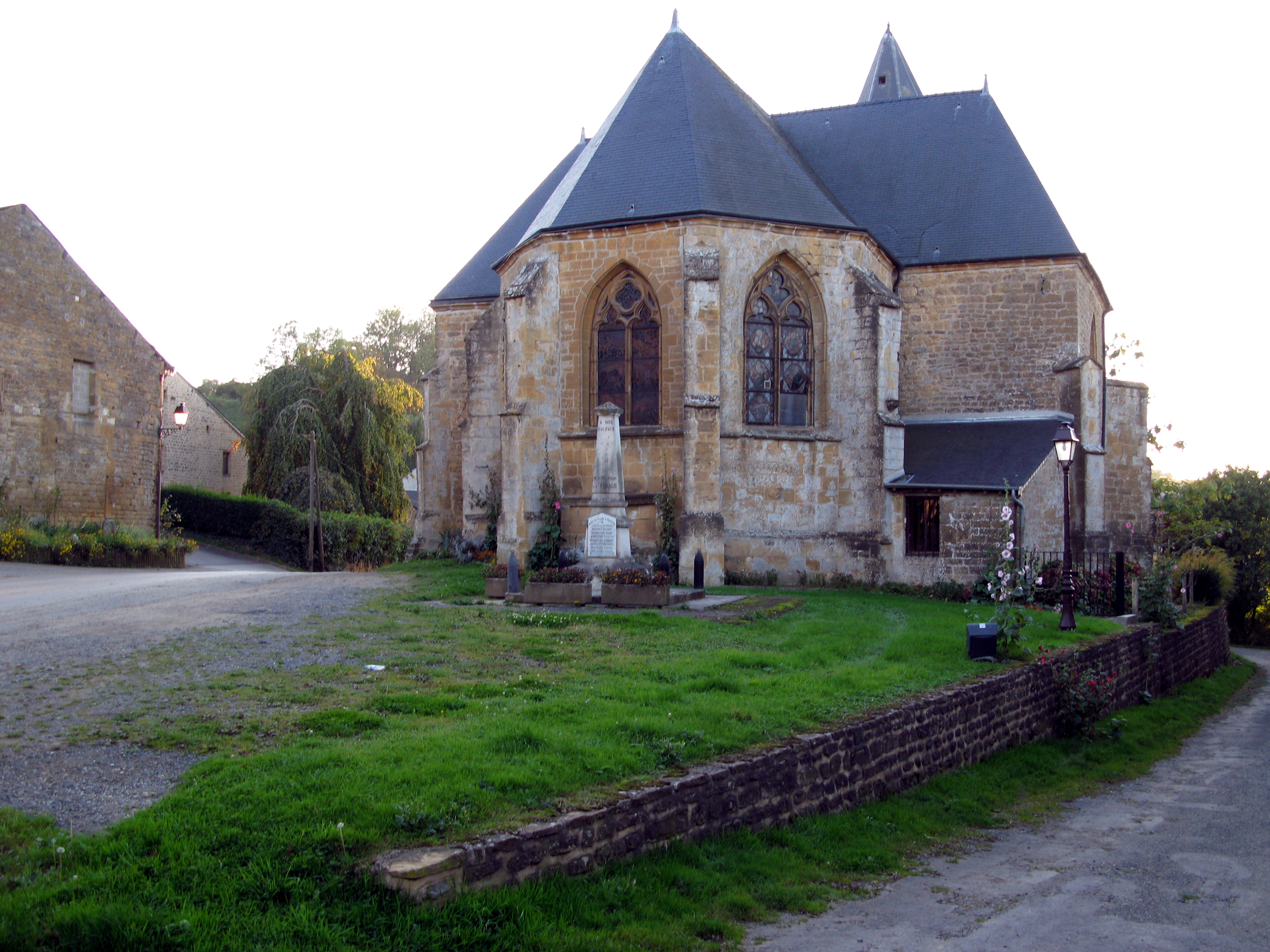 Monument aux morts et église fortifiée Saint-Martin de Remilly-les-Pothées (Ardennes, France) .